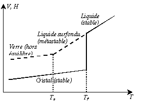 * Variations thermiques du volume spécifique V, de l’enthalpie H et lors du passage de l’état liquide à l’état solide, pour un matériau vitrifiable Schéma réalisé par utilisateur:Clem Cousi Utilisateur:Clem Cousi